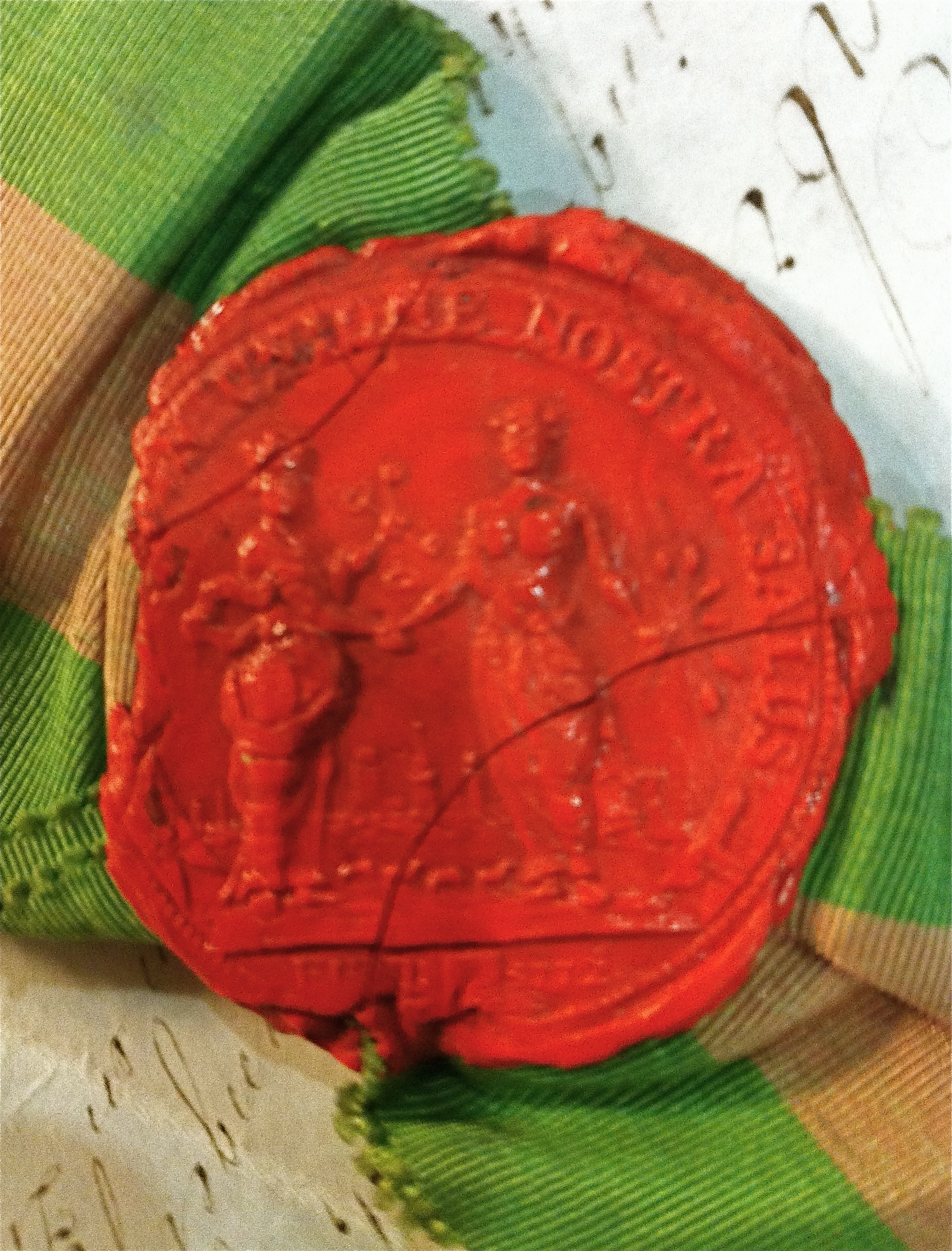 Detail van zegel en diploma Antoni Gabriel Zeegers.